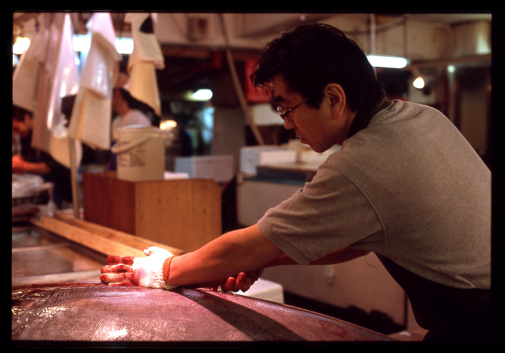 Tsukiji, Japan Butchering a 400Kg tuna